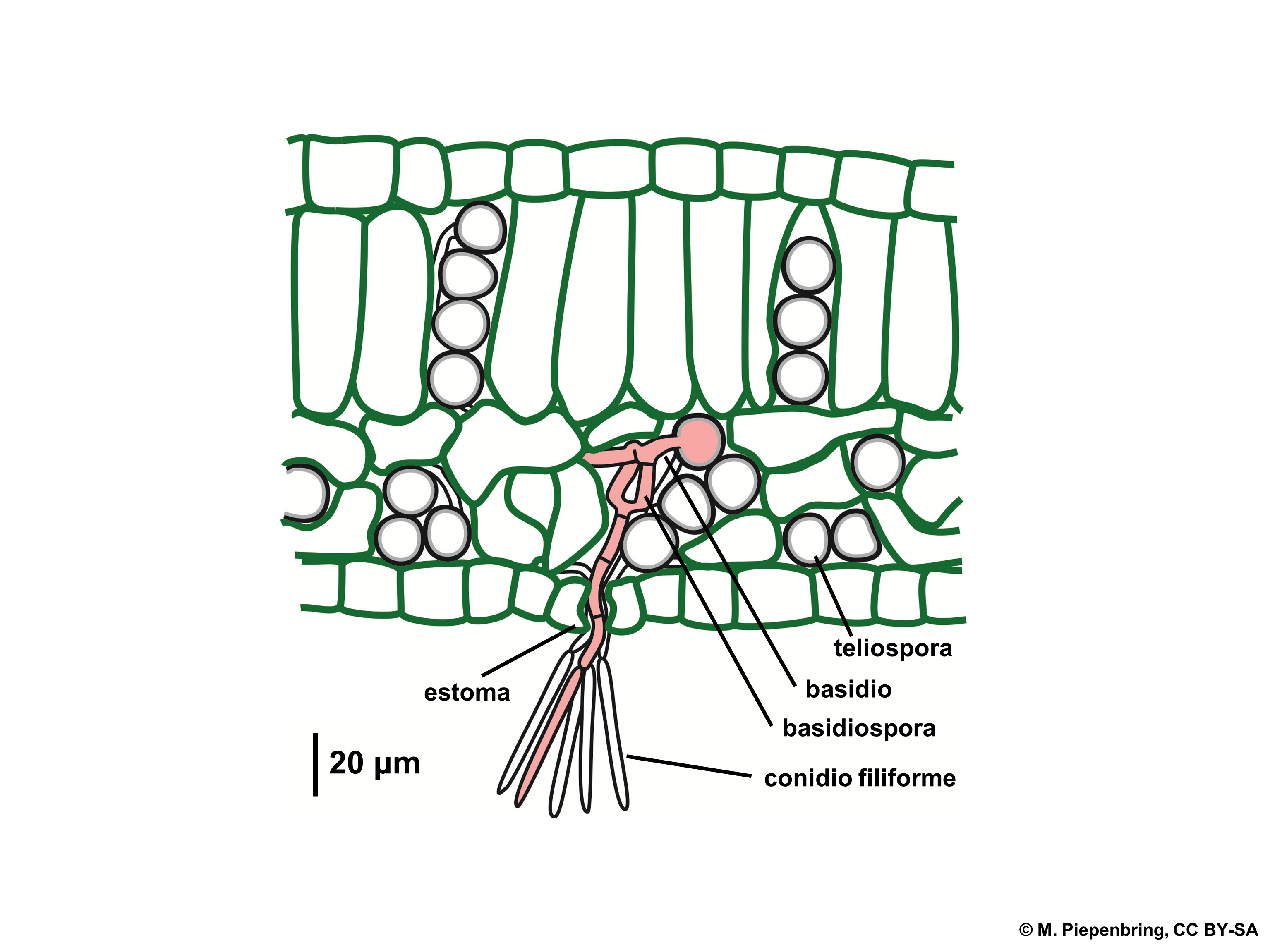 Biologische Schemata, gezeichnet und freigegeben von M. Piepenbring